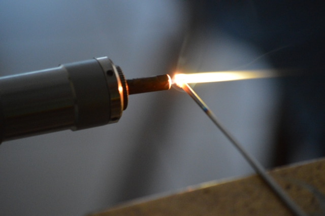 Knallgasflamme HHO Oxyhydrogen